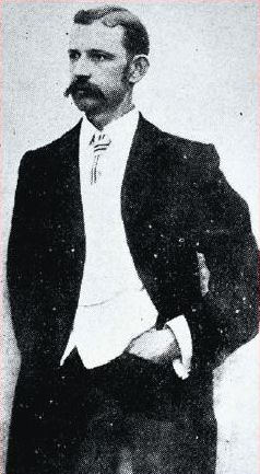 Photo de James J Giltinan